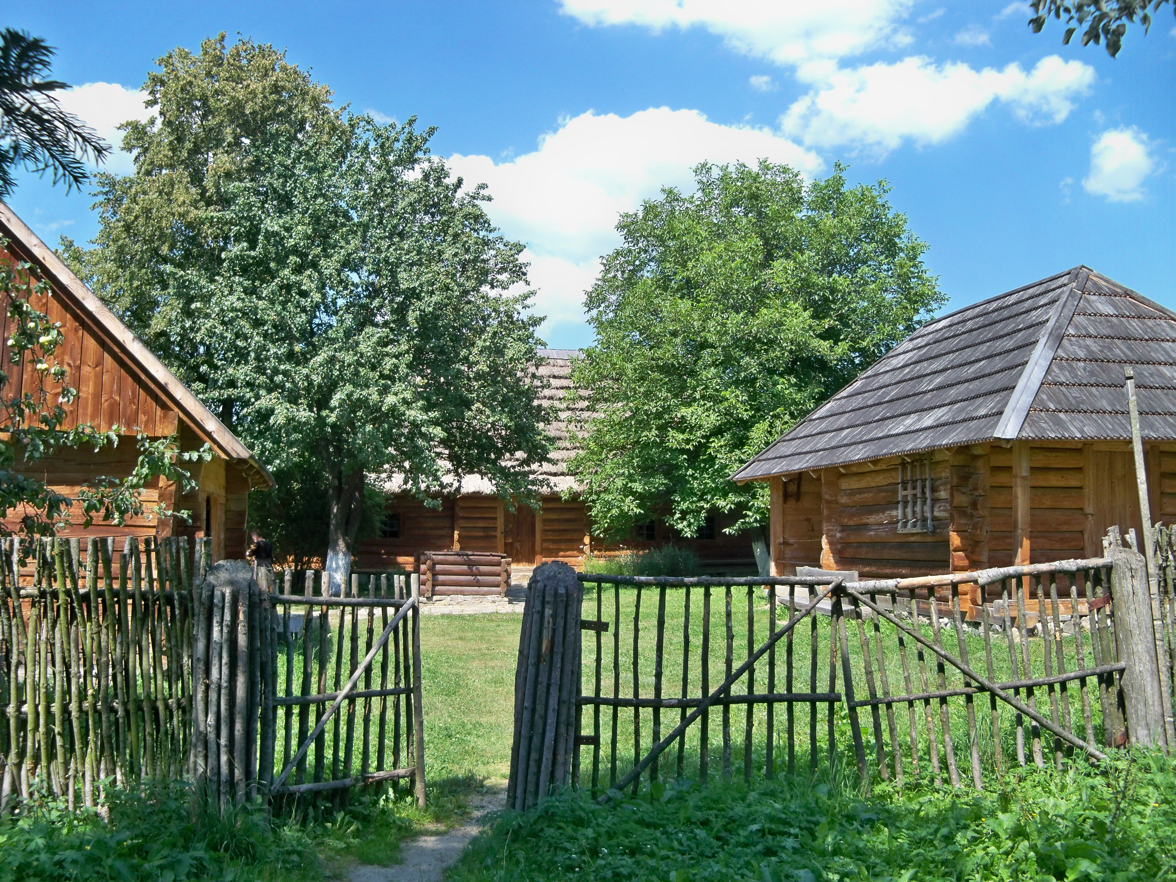 Садиба Франка І.Я., укр. письменника, вченого (інженер-мистецтвознавець І.Сенів, 1981), с.Нагуєвичі, при в’їзді у село